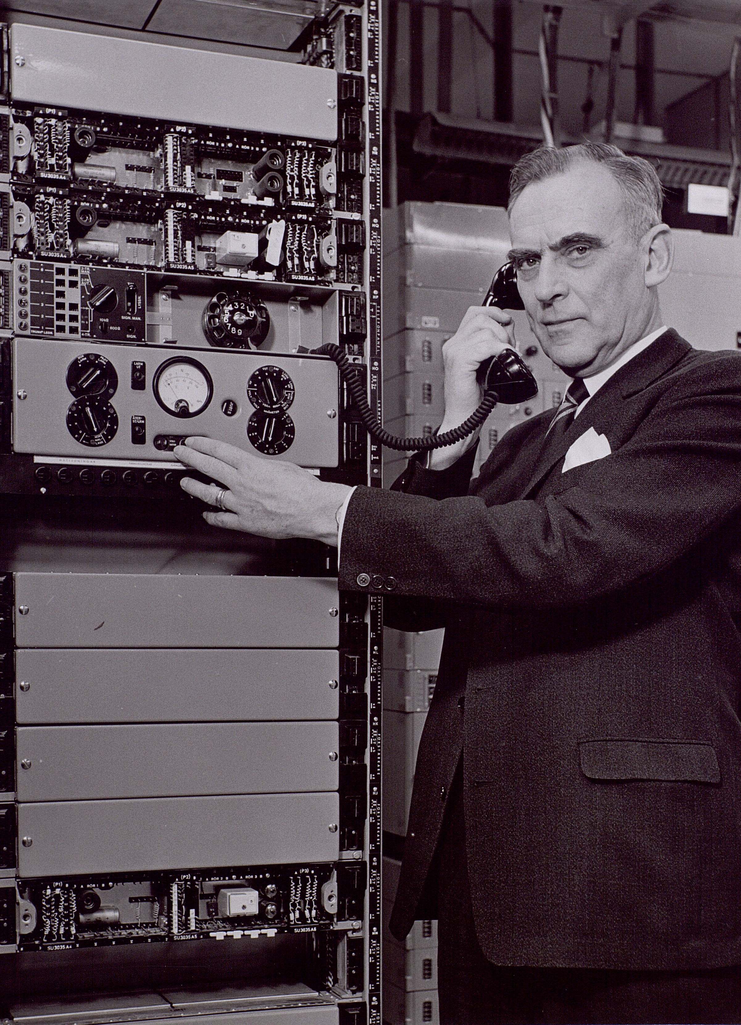 Generaldirektör Håkan Sterky. År 1962.